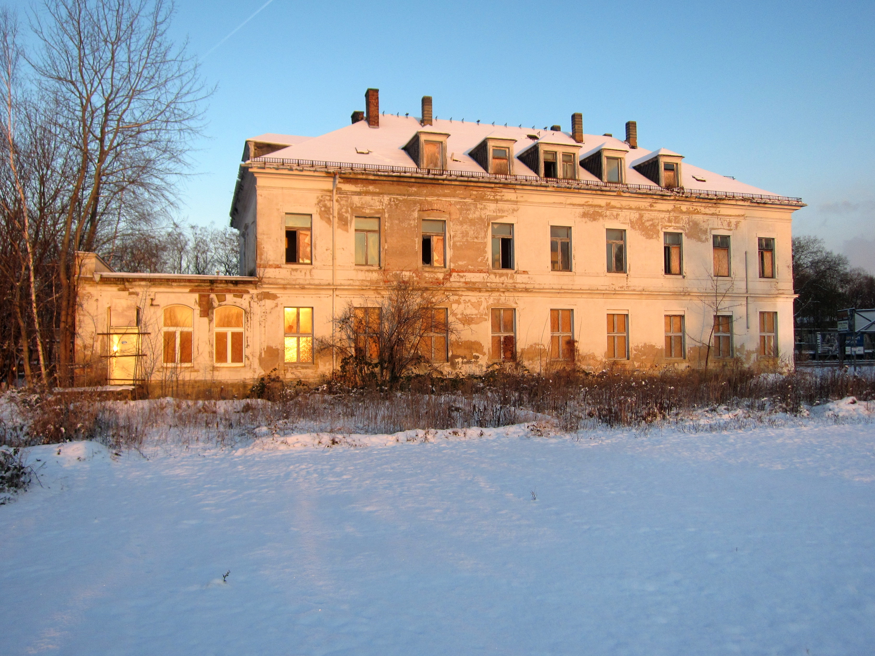 Die Villa Leipziger Straße 27 ín Dresden Anfang 2016 vor Beginn der Sanierung. Westfassade mit Anbau.